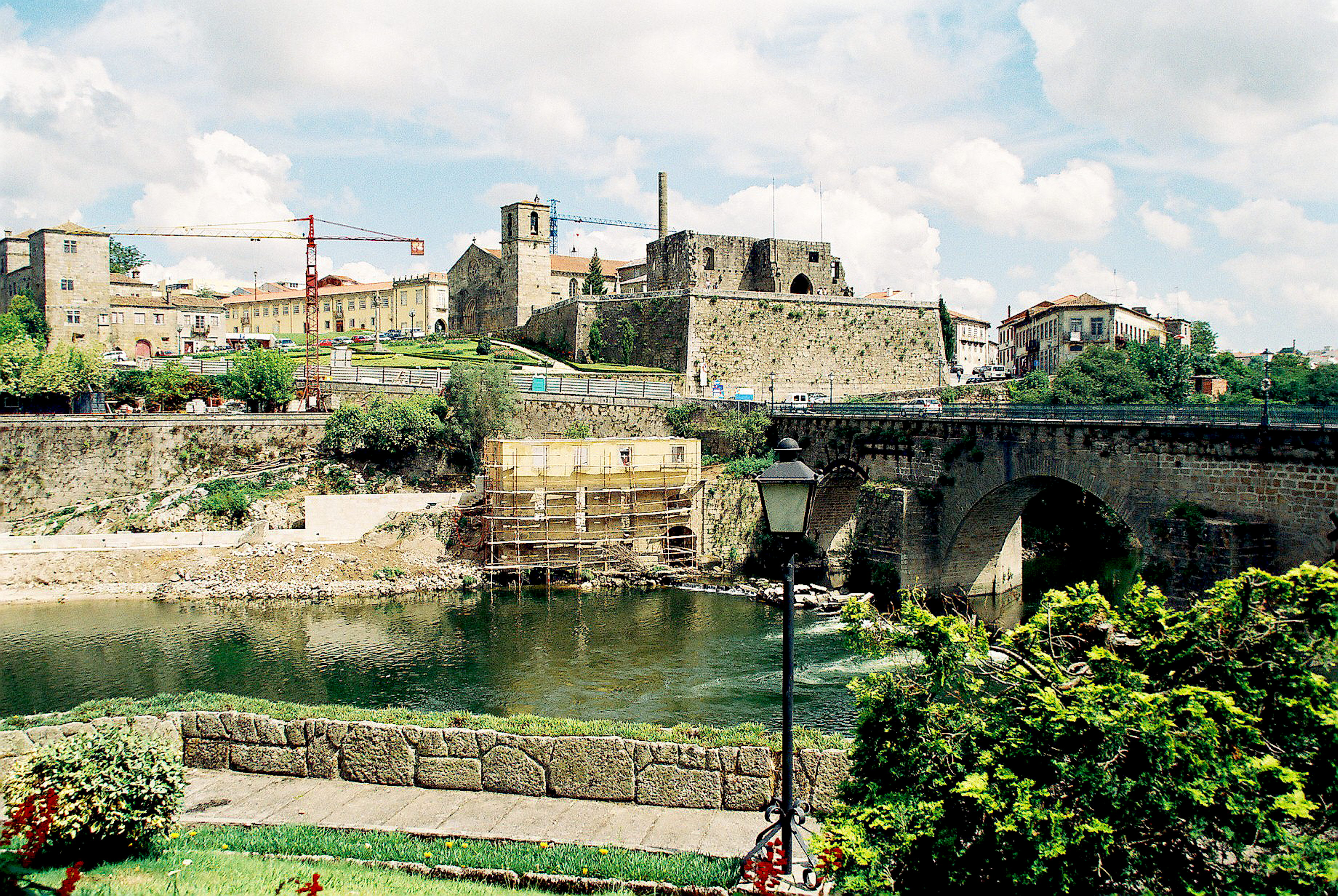 Barcelos Fotografia de Vitor Oliveira, integrada na colecção com o endereço